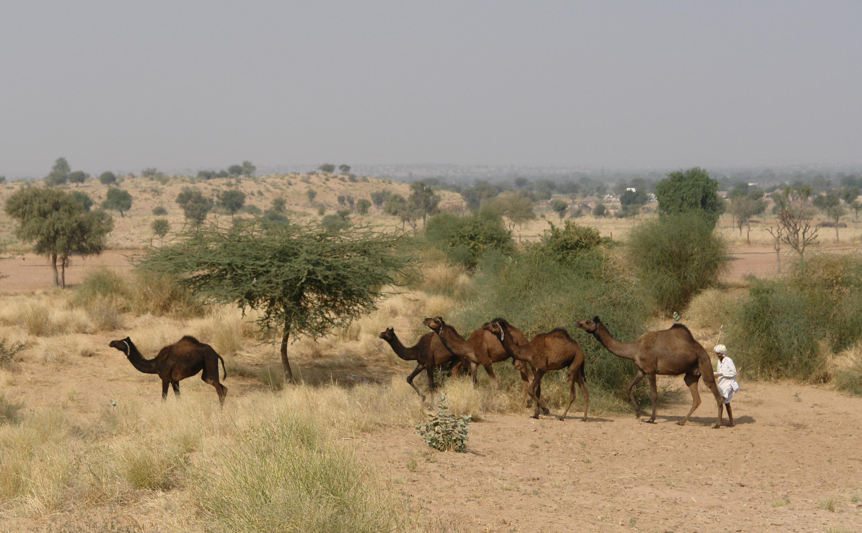 Camels, Osyam, Rajasthan, India.